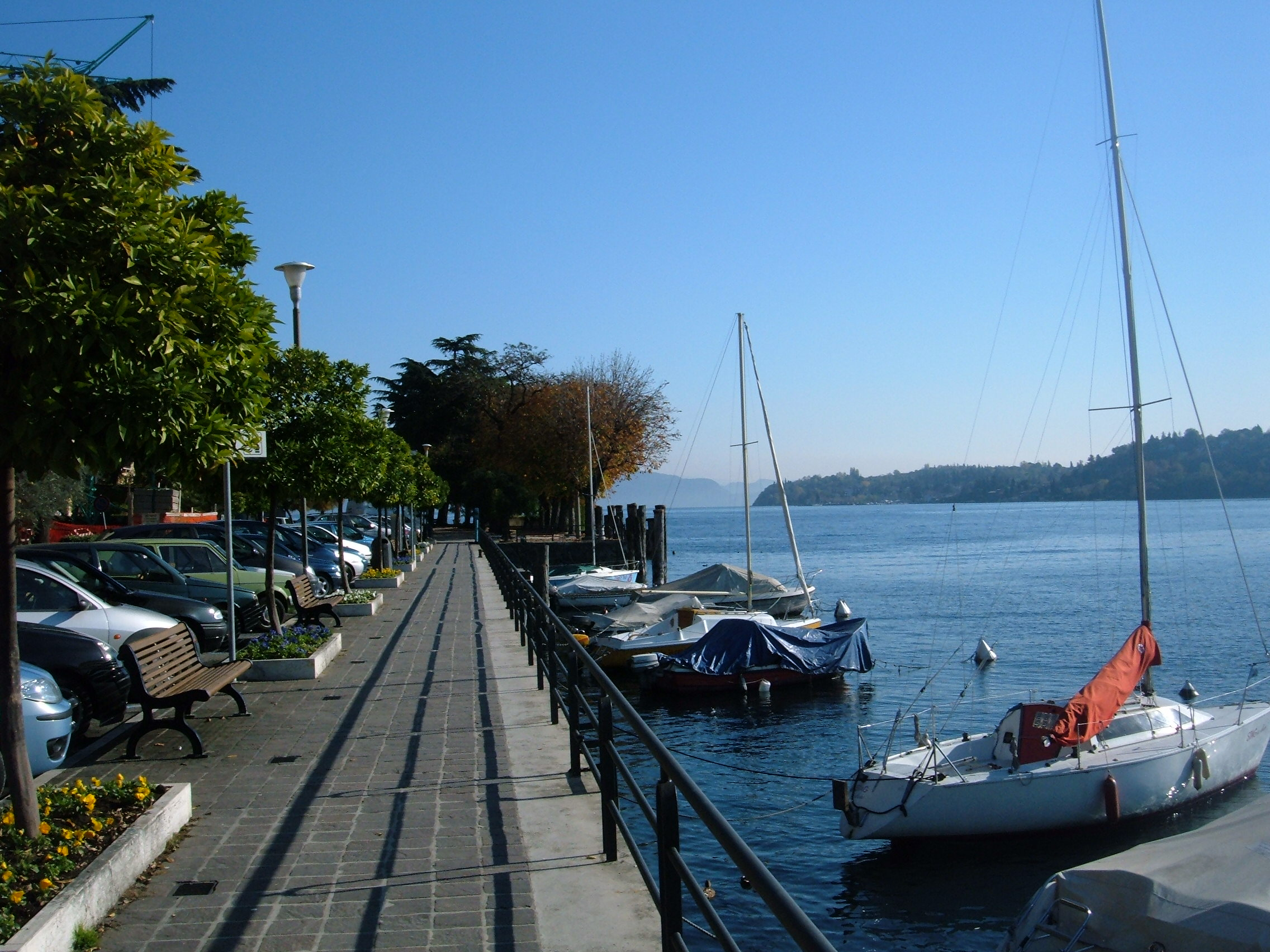 Fabio Bonelli [1]